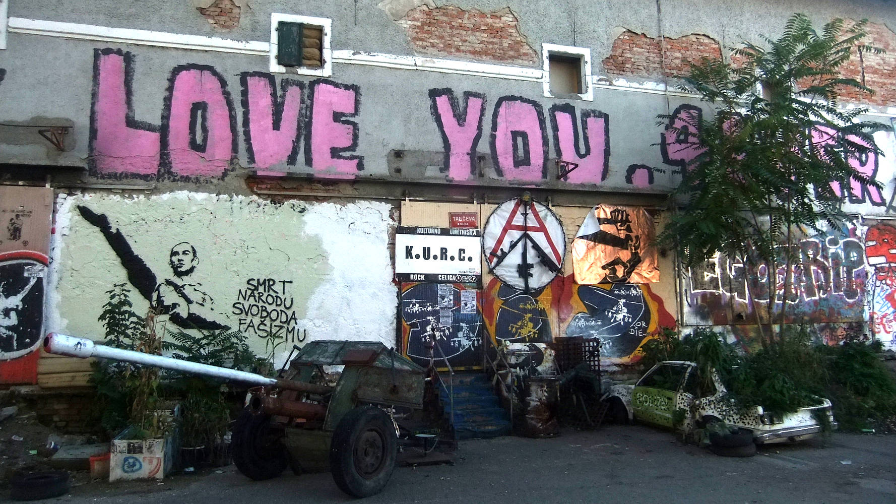 Detailansicht auf dem Gelände des Kulturzentrums Pekarna in Maribor.